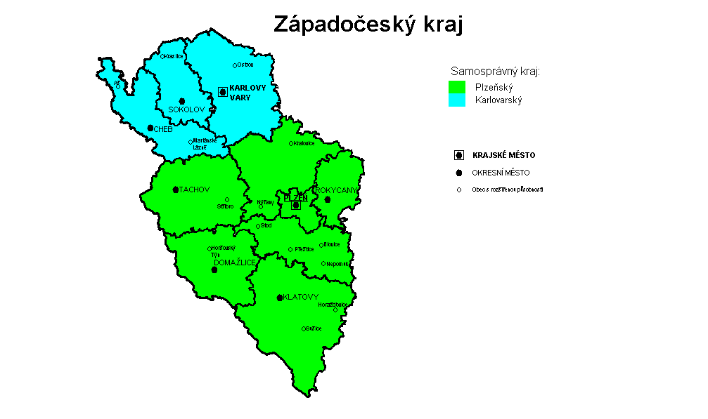 Mapa Západočeského kraje (1960-1990). Upraveno z mapy NUTS na české wikipedii)